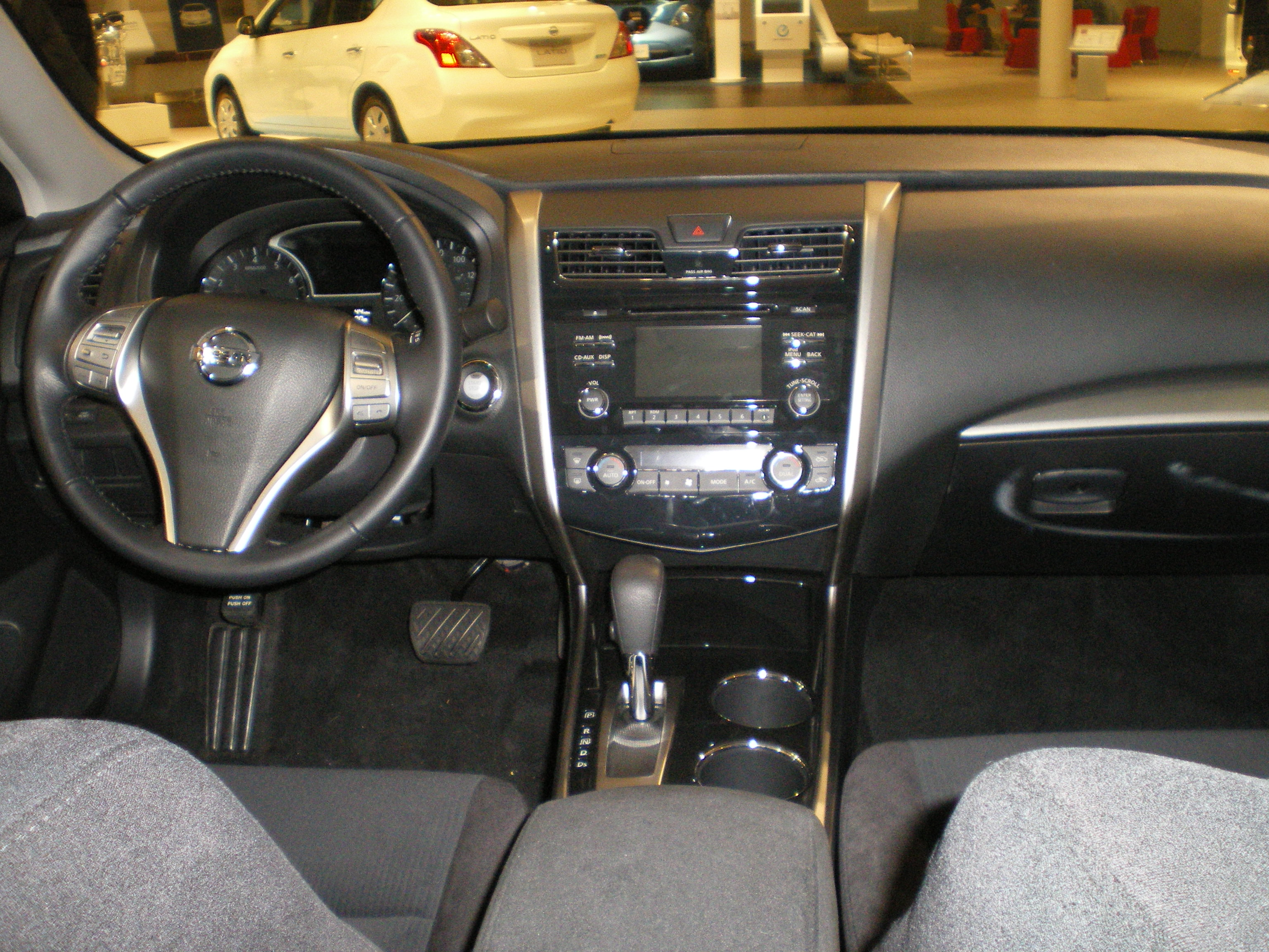 日産・アルティマ